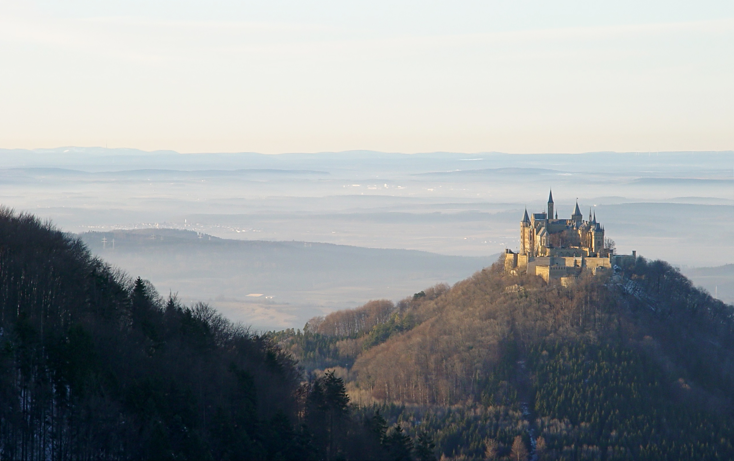 Die Burg Hohenzollern, den Horizont bildet der Schwarzwald mit der Hornisgrinde links